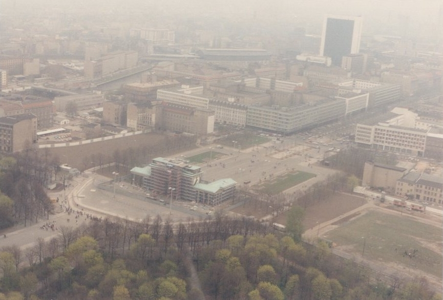 Brandenburger Tor under maintenance in 1990